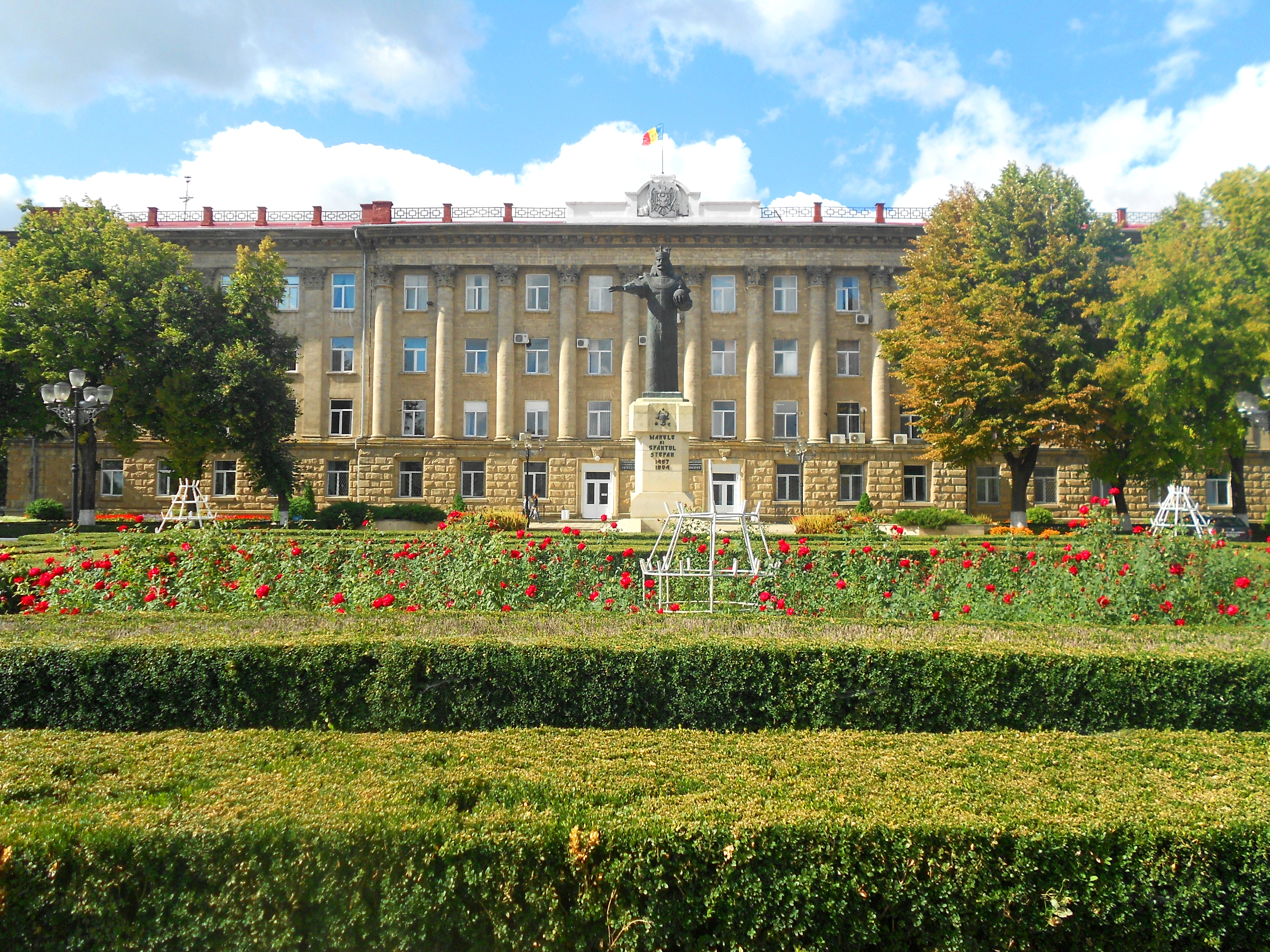 Piața Independenței din Bălți